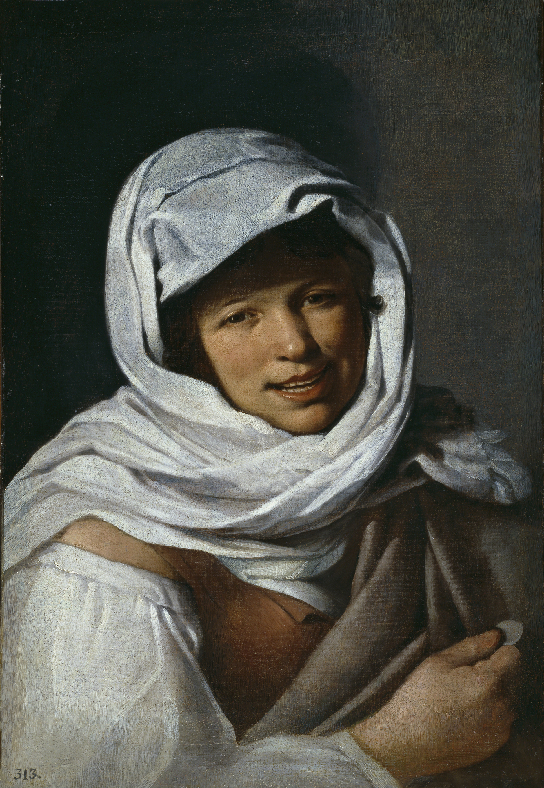 La gallega de la monedatitle QS:P1476,es:"La gallega de la moneda" label QS:Les,"La gallega de la moneda"